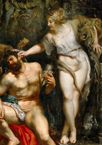 Herkules am Spinnrocken, Omphale mit dem Löwenfell und der Keule des Helden; Apollodoros II, 6,3